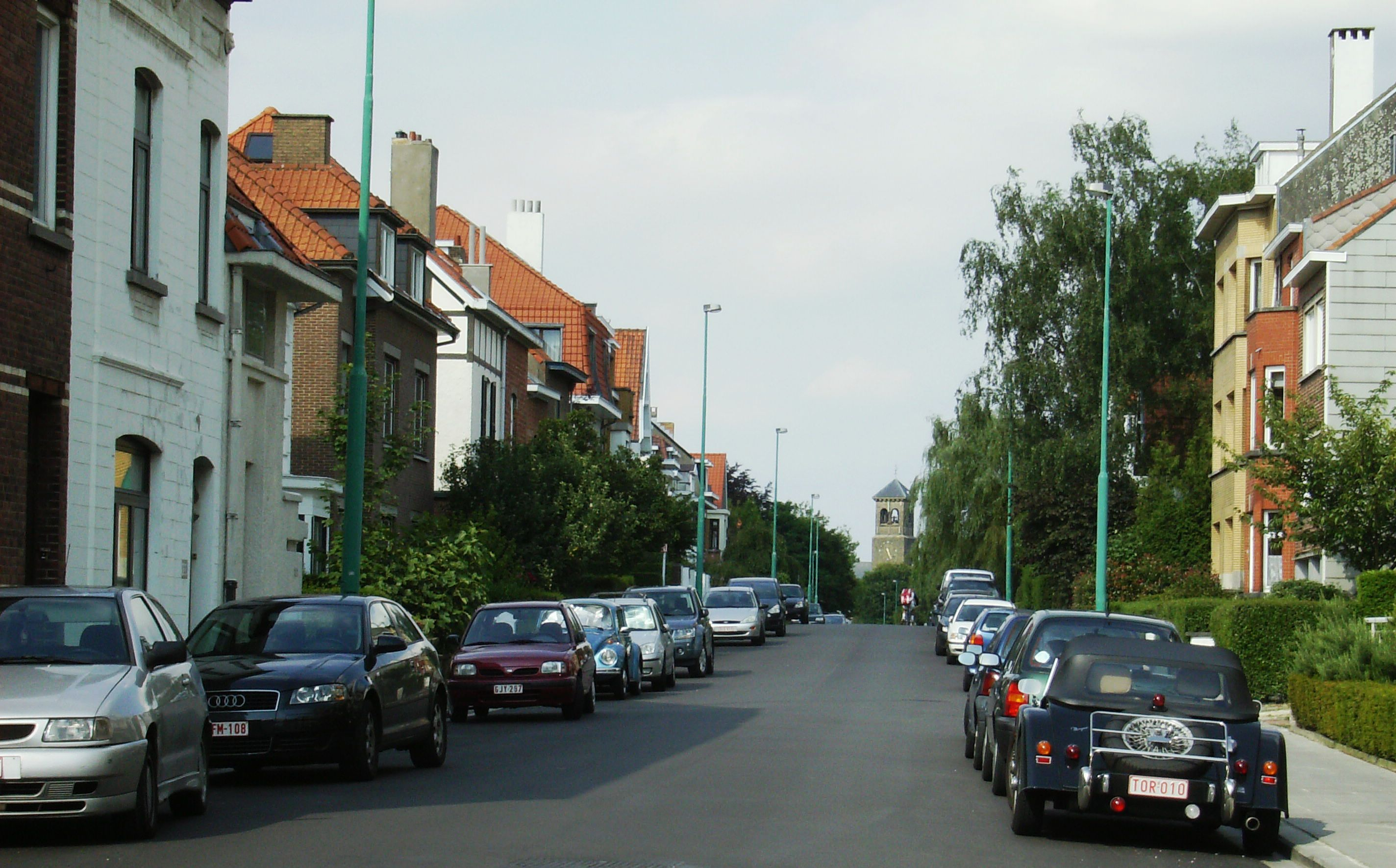 avenue du Chant d'Oiseau Auderghem Woluwe-Saint-Pierre Belgium